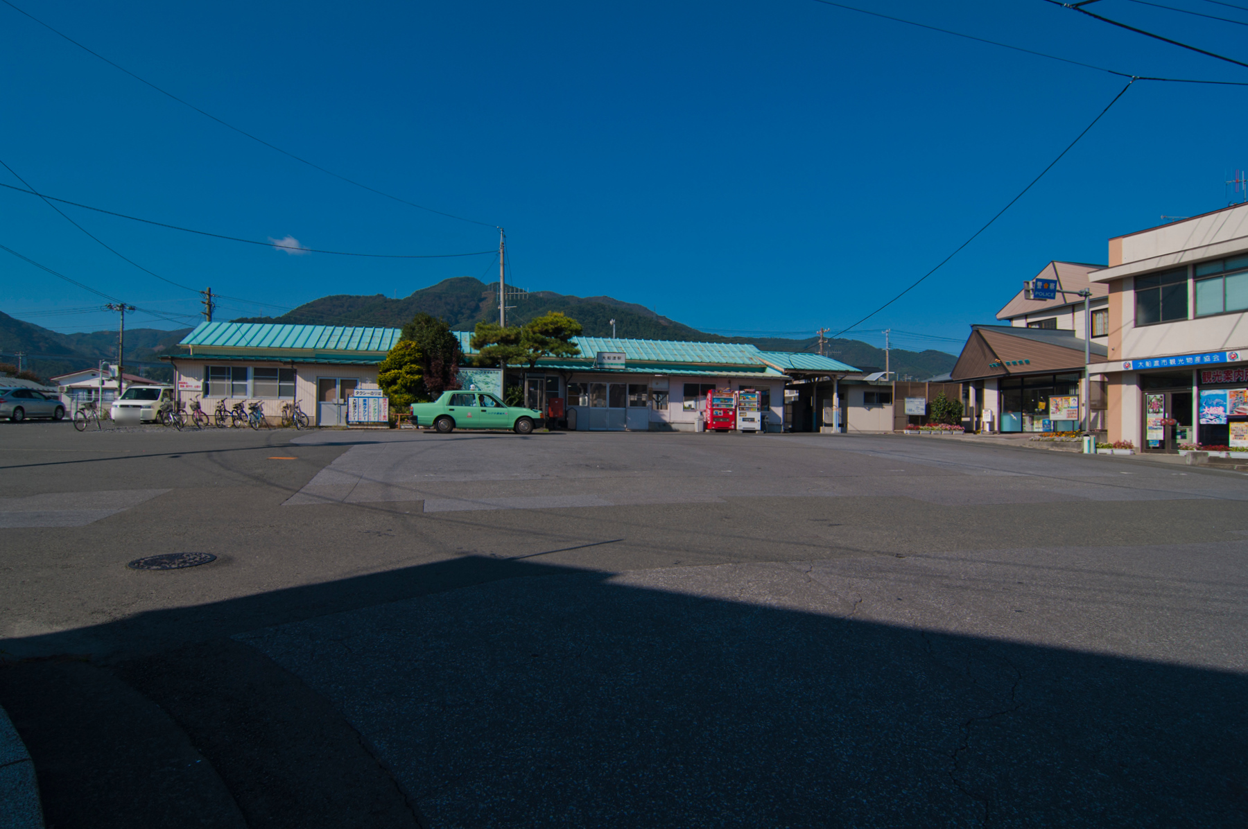 東日本旅客鉄道大船渡線大船渡駅